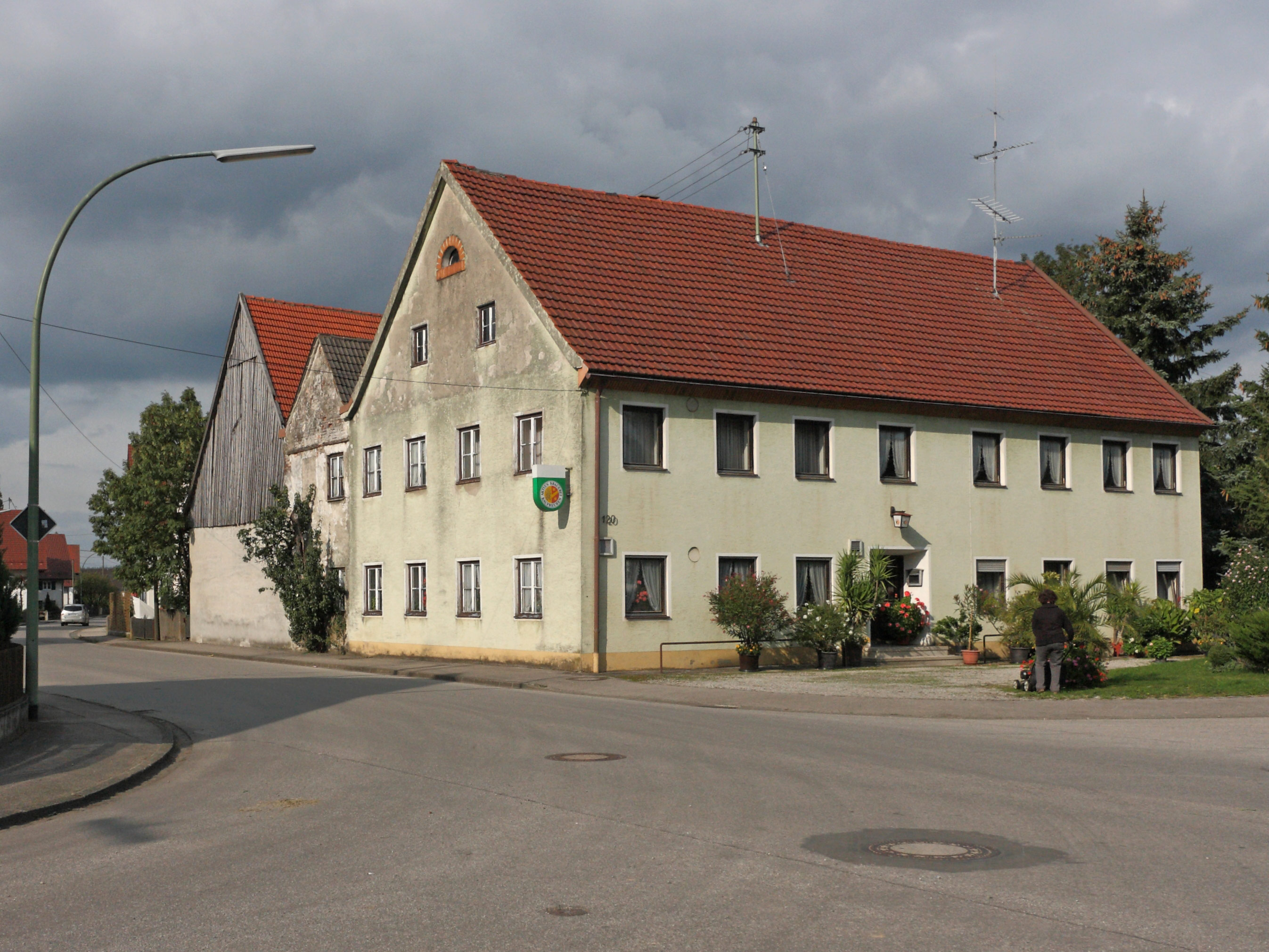 Ehem. Gasthof Adler, Baugruppe dreier parallel aneinandergebauter Satteldachhäuser, Mitte 19. Jh.